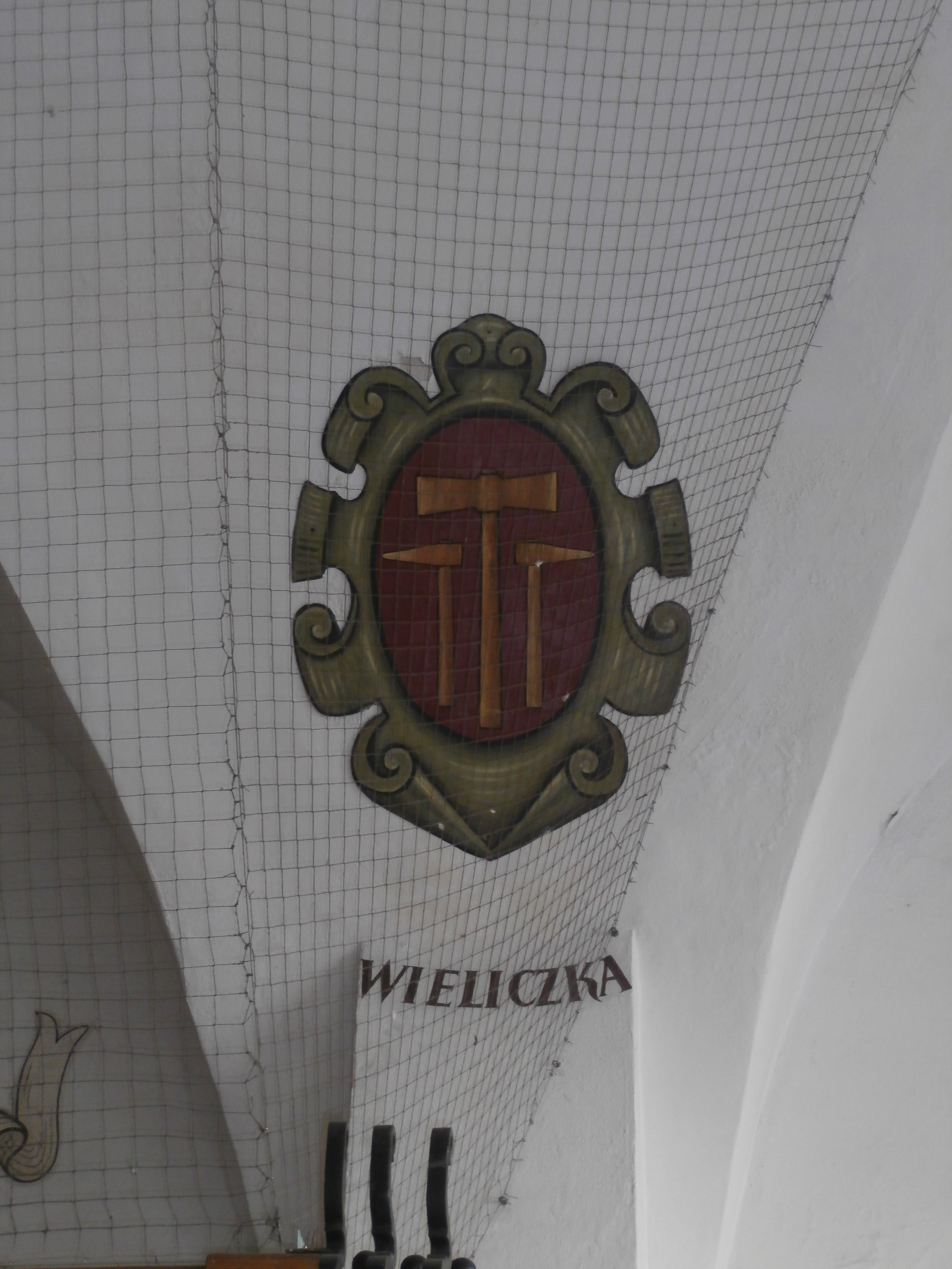 Herb Wieliczki we wnętrzu Krakowskich Sukiennic.